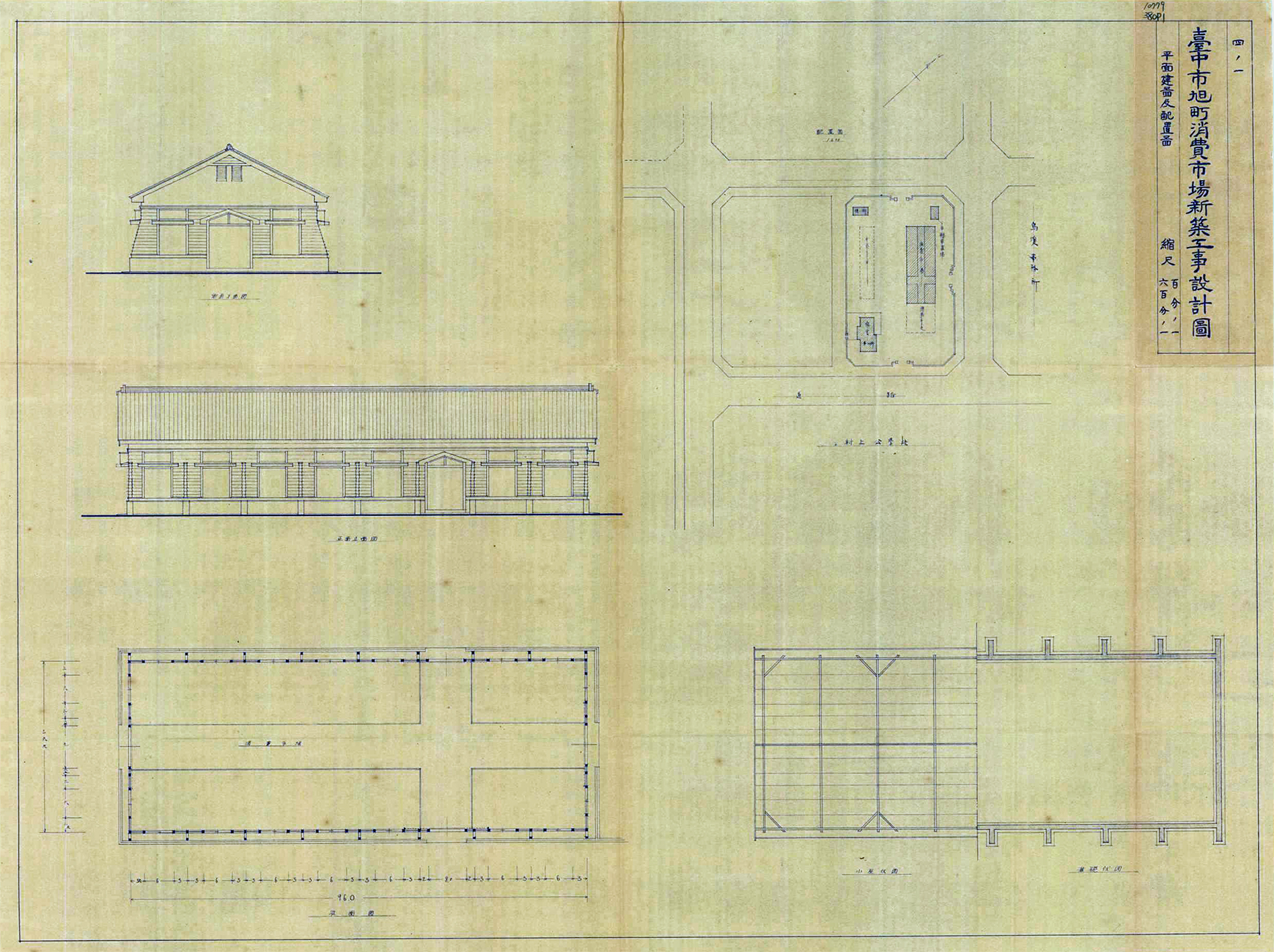 臺中市旭町消費市場為現今臺中市第五市場